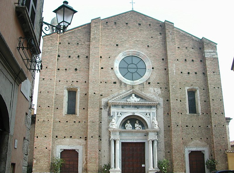 Il Duomo Santa Maria Annunziata di Salò